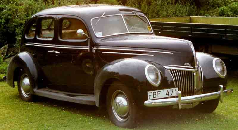 Ford Model 91A 73B De Luxe Fordor Sedan 1939